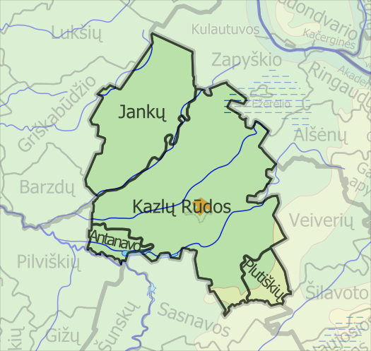 Padaryta iš lt::image:LietuvosSeniunijos.png